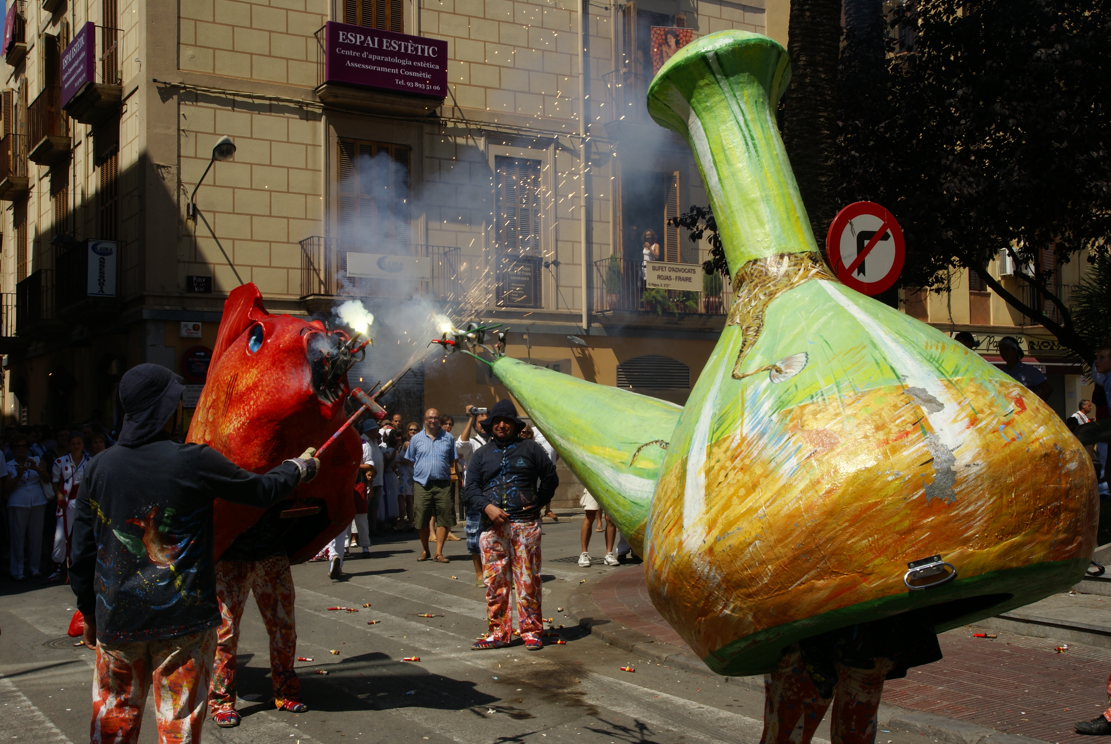 La Carpa i el Porró